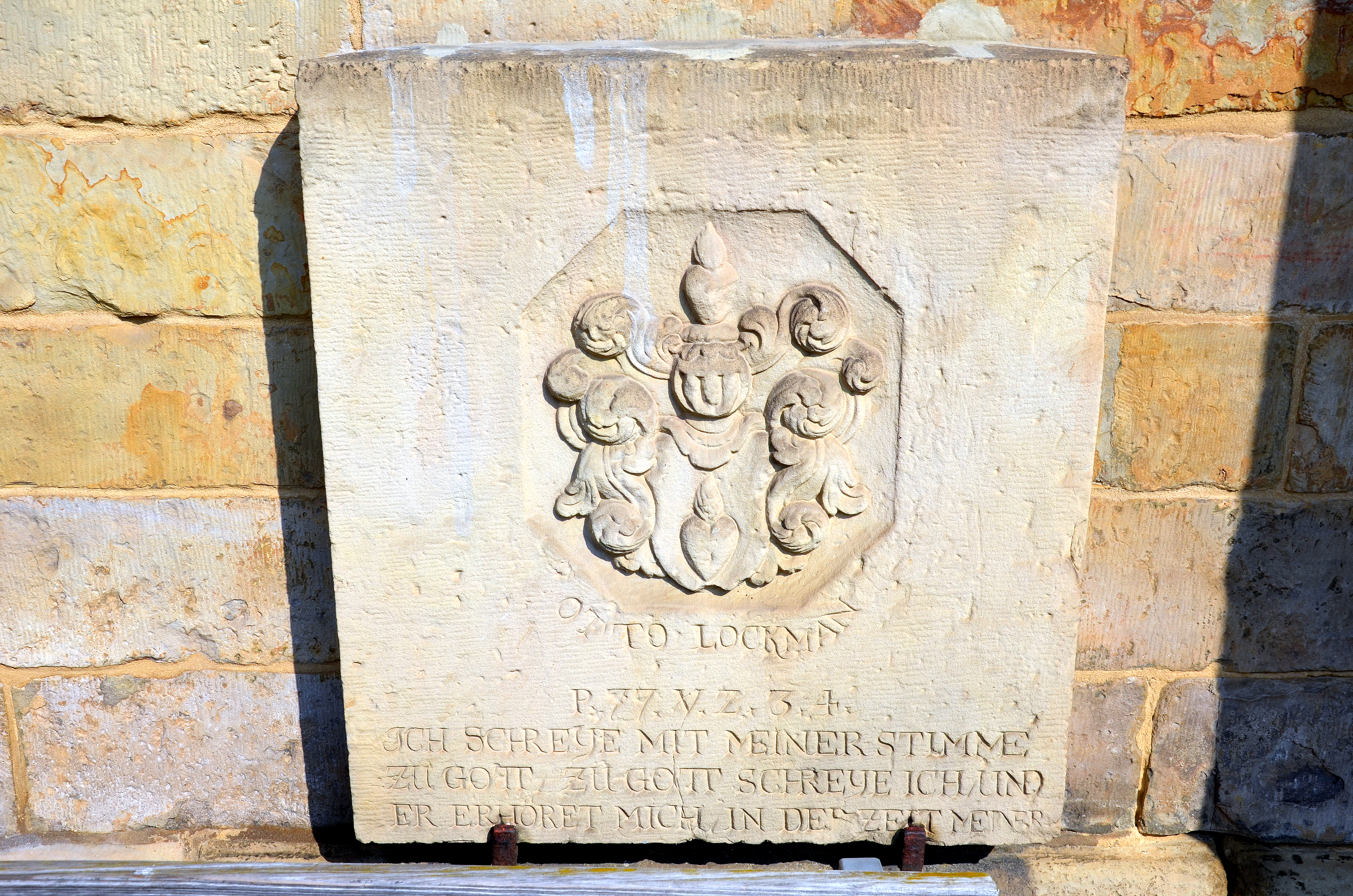 Wappen des Kurfürstlich-Hannoverschen Hoffouriers und Sänften-Unternehmers Otto Lochmann in dessen Epitaph an der Außenwand der Neustädter Hof- und Stadtkirche St. Johannis in Hannover im heutigen Stadtteil Calenberger Neustadt. Otto Lochmann war der Stammvater der Adelsfamilie Lochmann von Königsfeld .